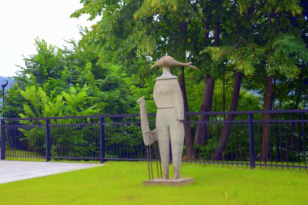 Rzeźba "Diana z sarenką" Romana Tarkowskiego, pierwotnie przy placu św. Jana, następnie przeniesiona w otoczenie Zamku Królewskiego w Sanoku.